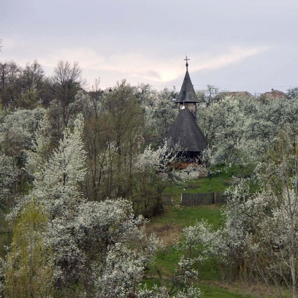 Sârbi, Sălaj: biserica de lemn, pe deal.